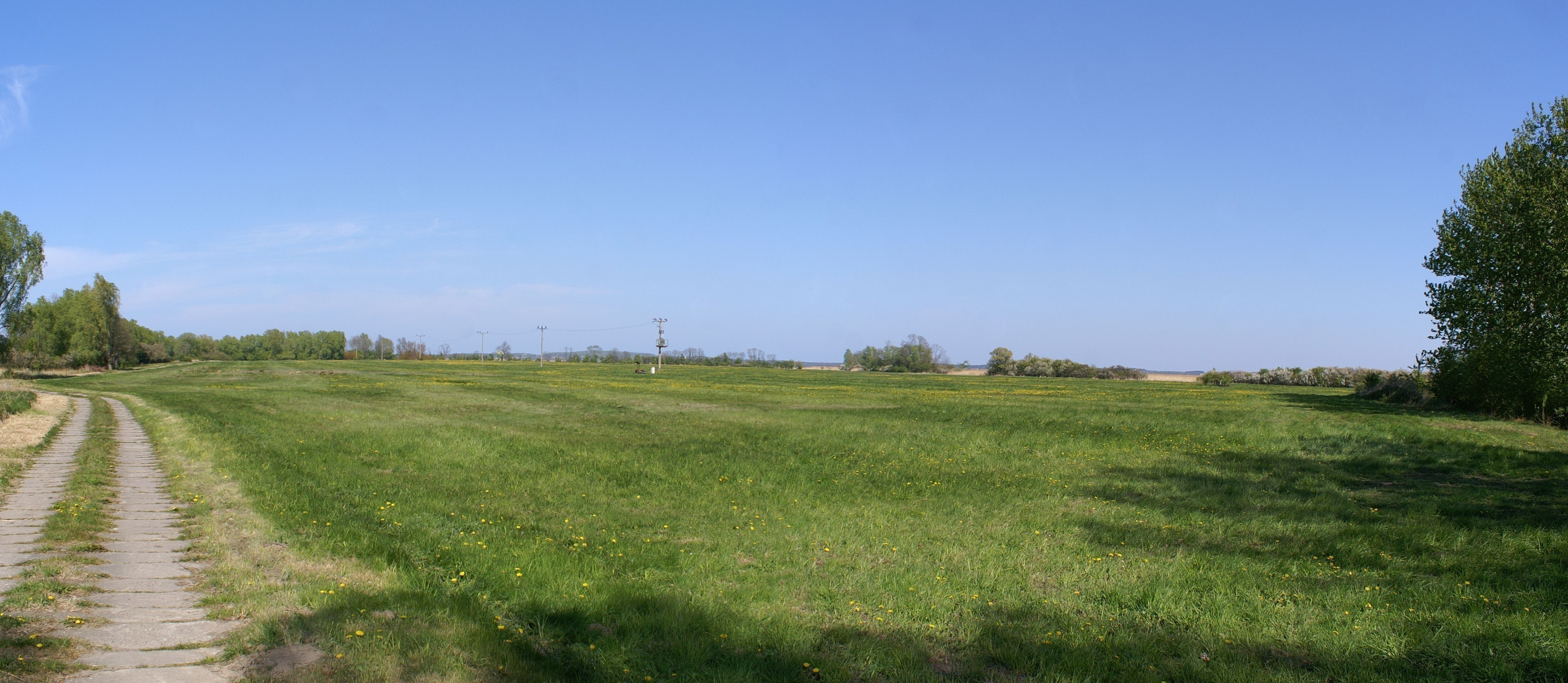 Insel Görmitz, Wiese im nördlichen Teil der Insel